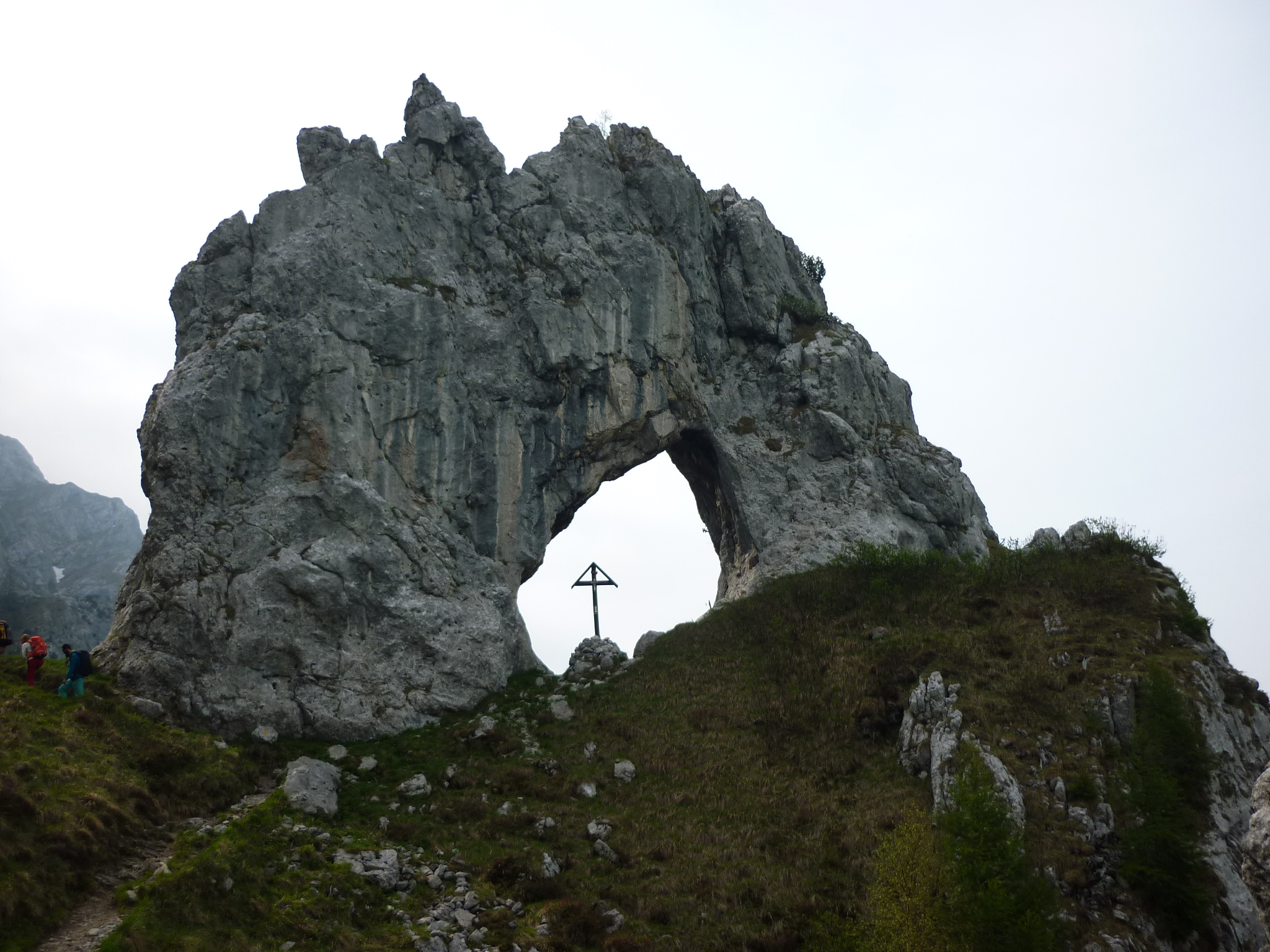 Tor von Prada, Gringa, Lombardei, Italien